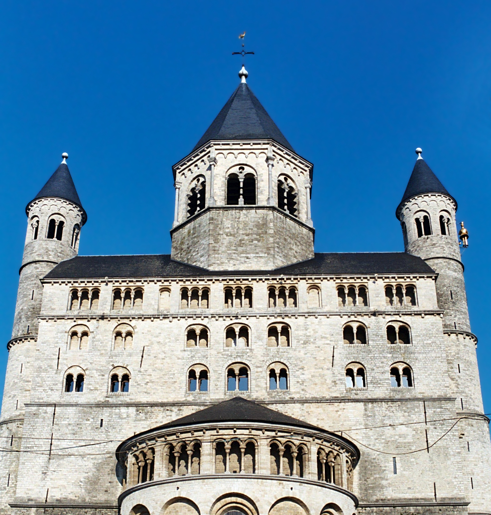 Belgique - Brabant wallon - Nivelles - Collégiale Sainte-Gertrude